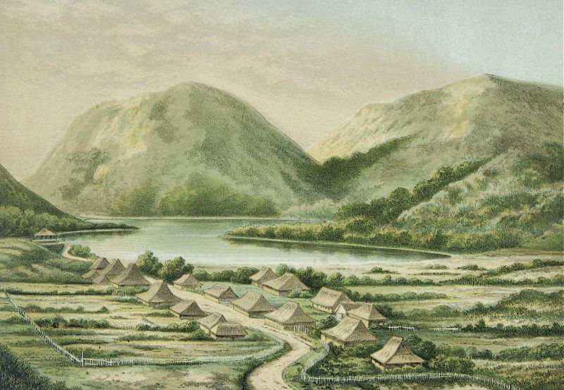 Litho. Litho naar een oorspronkelijke aquarel van J.C. Rappard.. Het meer Cebong